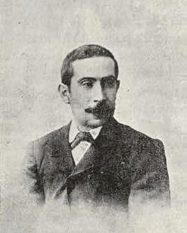 Fotografía de José Lupiáñez y Carrasco en 1902